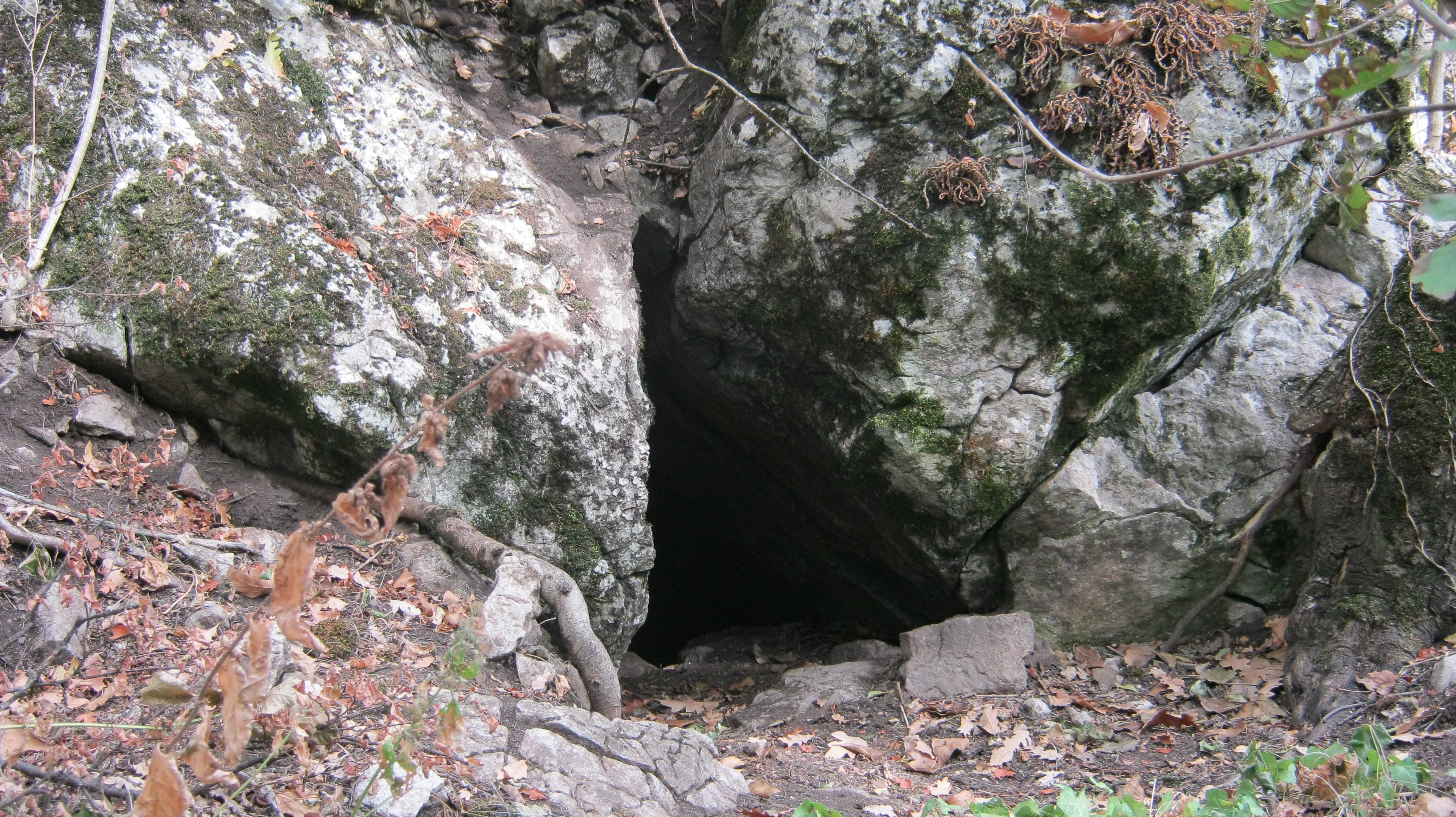 Српски (ћирилица): Пећина Мала Тамница на Гледићким планинама